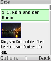 Screenshot von